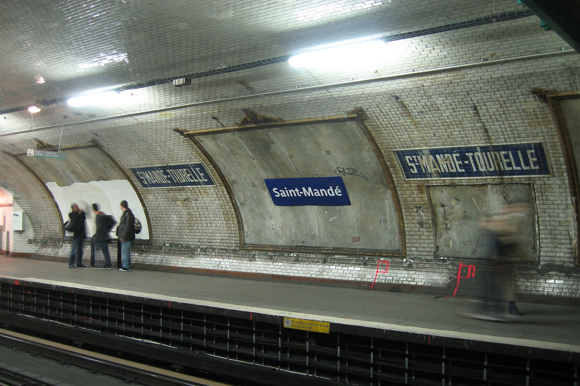 La station du métro parisien Saint-Mandé après décarrossage intégral.